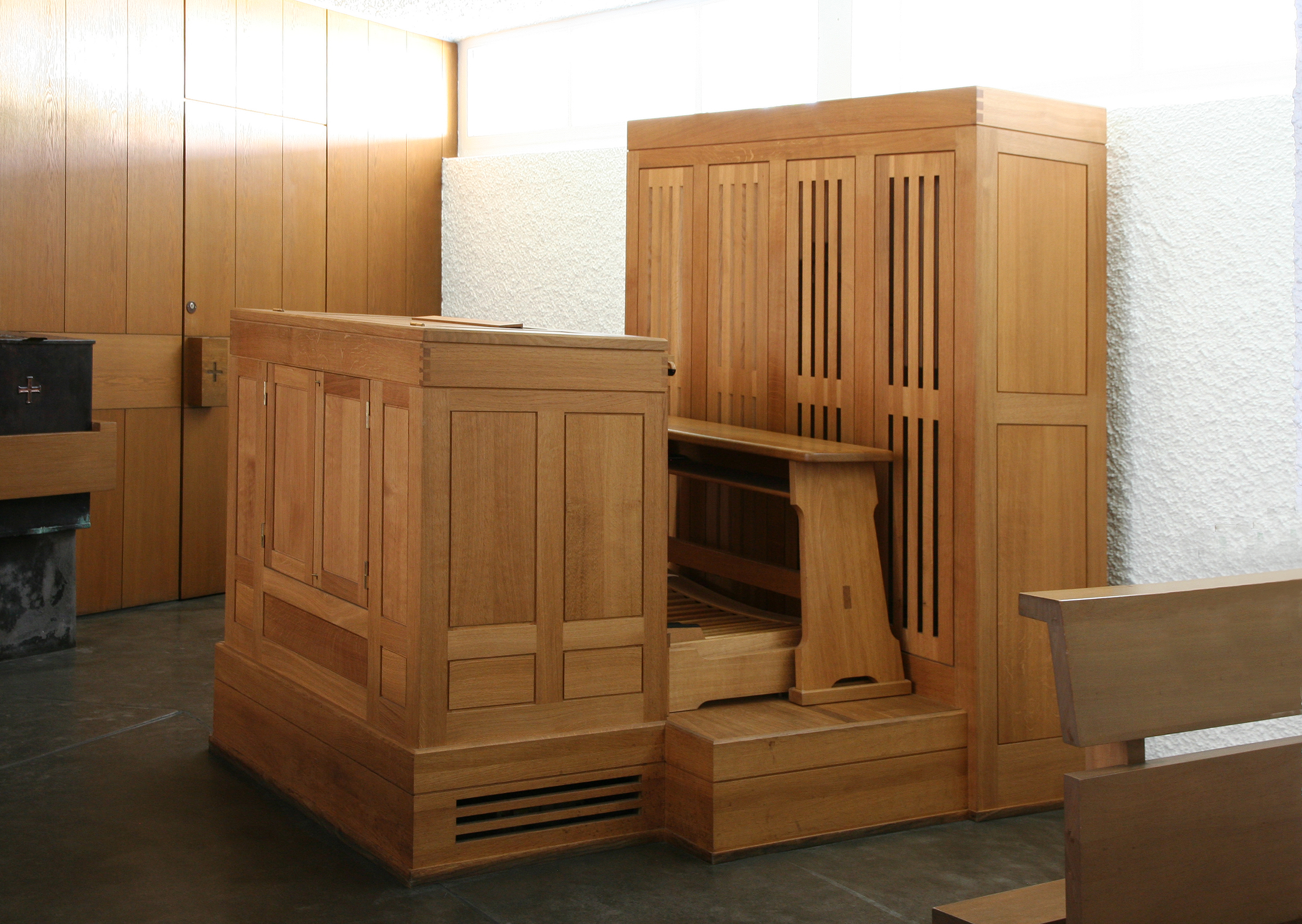 röm.-kath. Kirche St. Antonius Hauptwil Thurgau